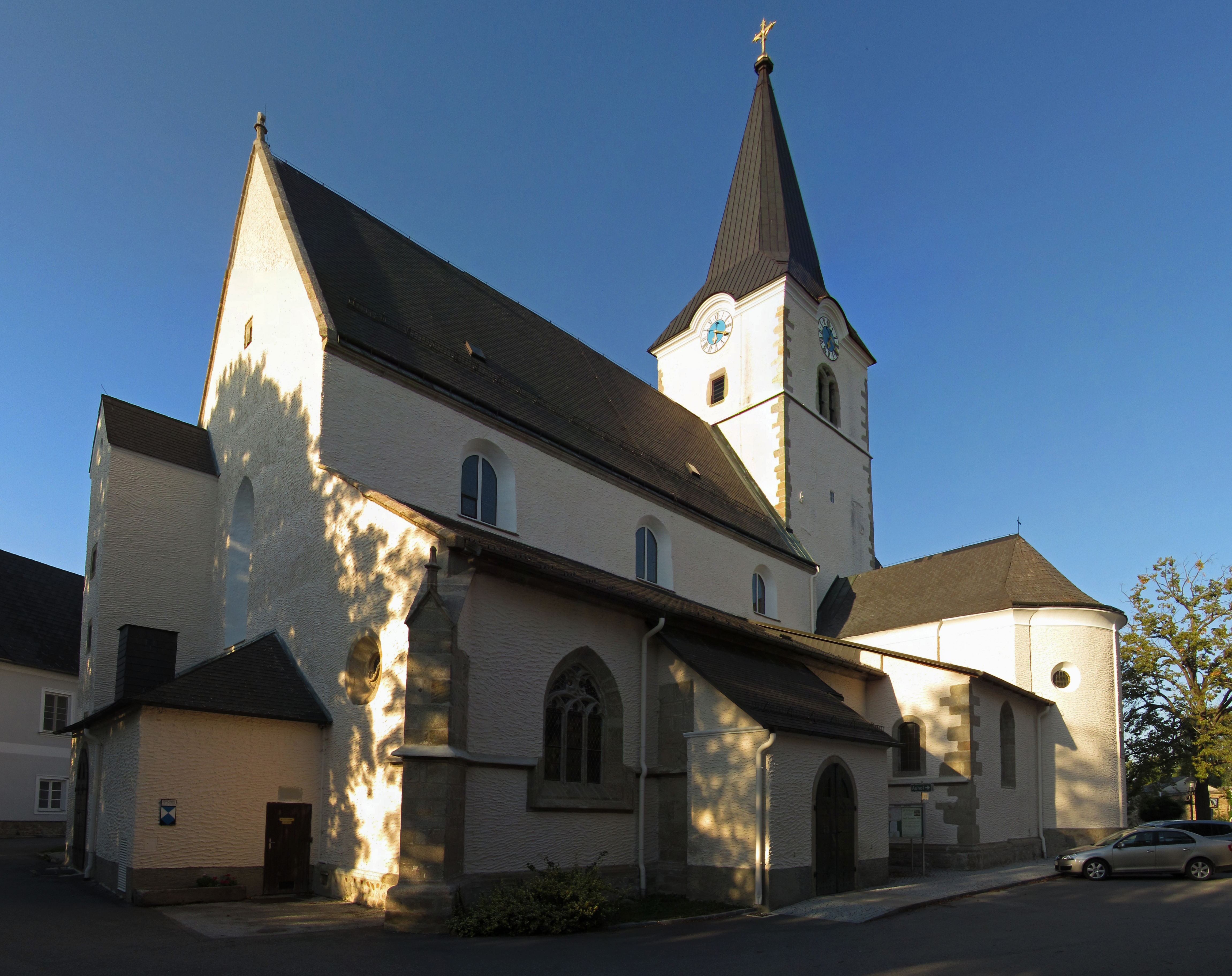 Die Anfang des 13. Jahrhunderts erbaute, ursprünglich romanische Kirche wurde im 15. Jahrhundert durch spätgotische Erweiterungsbauten zu einer dreischiffigen Basilika umgewandelt. Der Hochaltar ist ein Werk von Johann Walser aus dem Jahr 1749. Das Altarblatt eines Seitenaltars wurde 1747 von Martin Johann Schmidt gemalt. Josef Rifesser schuf 1904 die neugotischen Altäre in der Barbarakapelle.